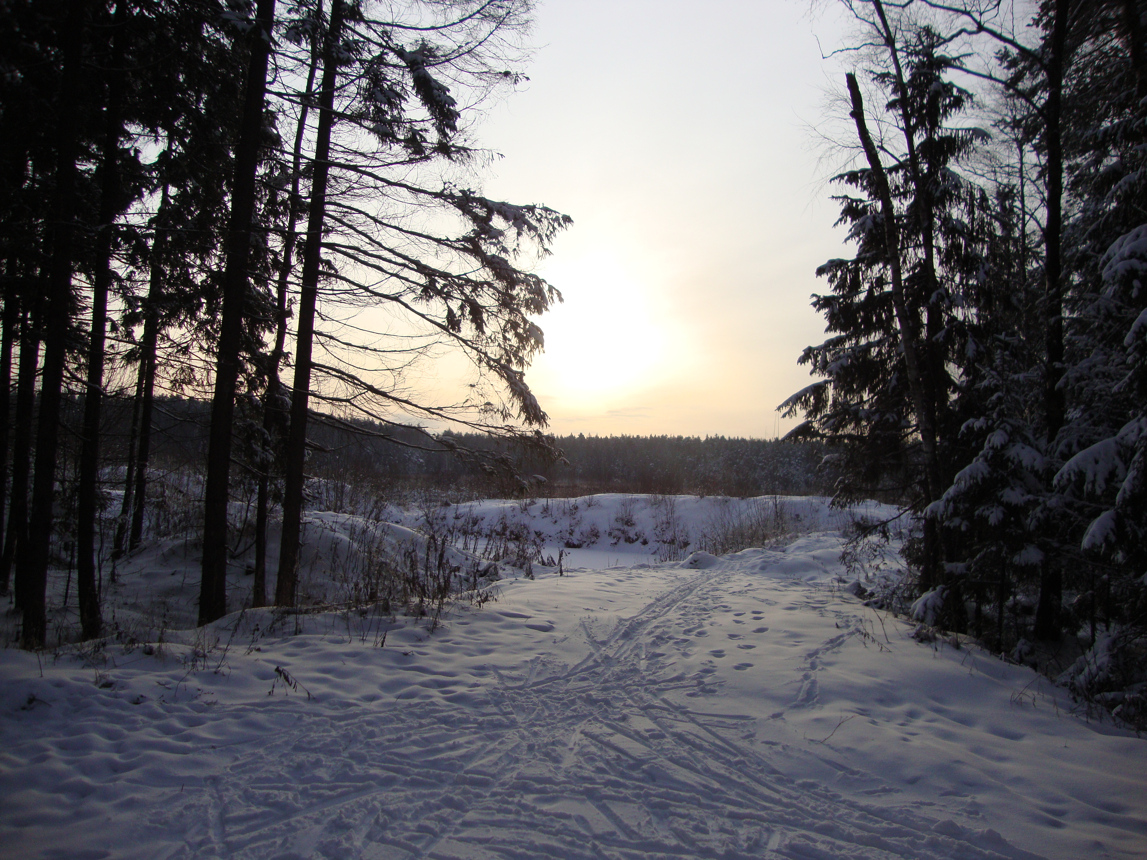 Озеро Круглое